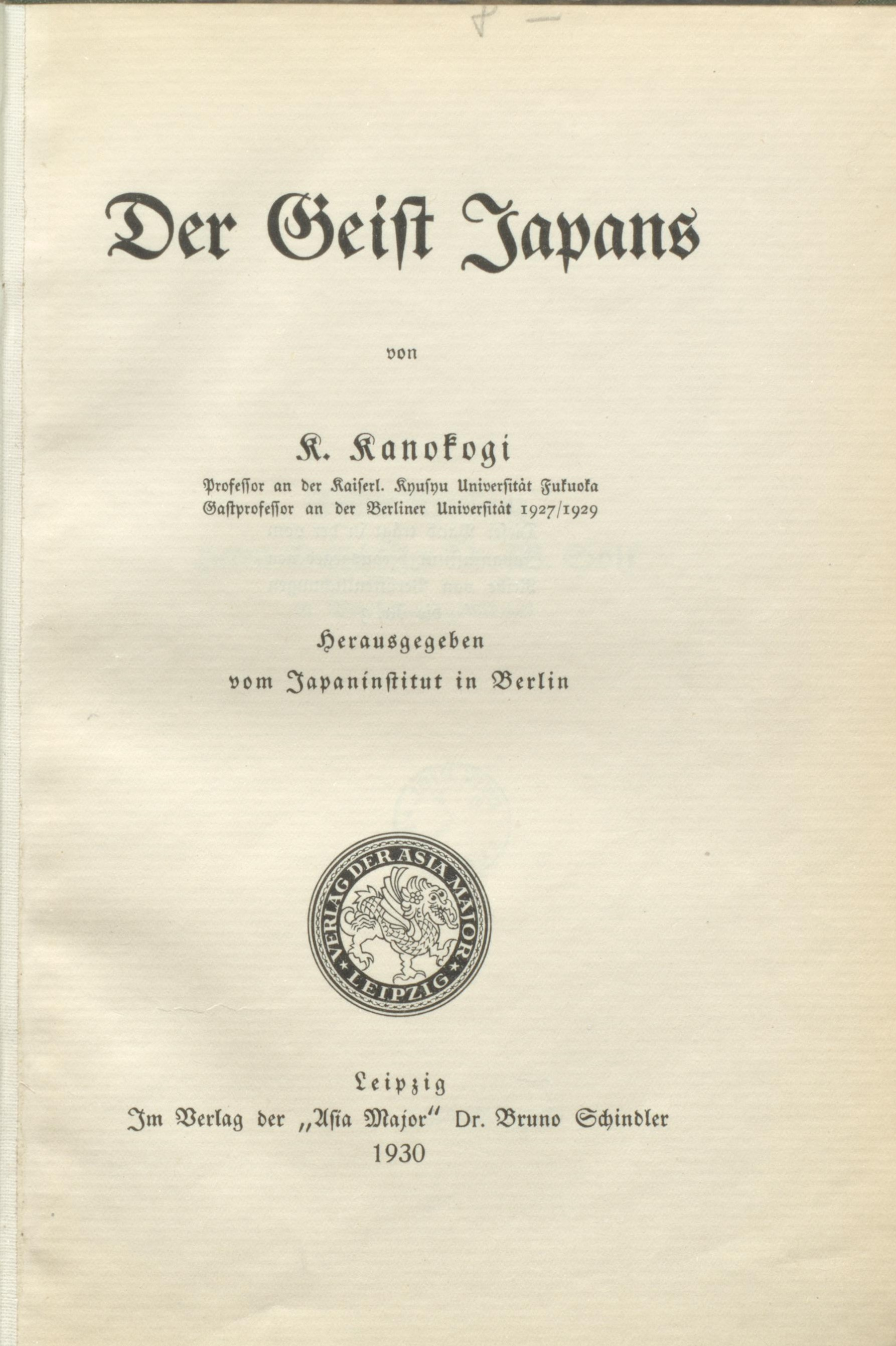 Kanokogi Kazunobu Der Geist Japans Leipzig Schindler Titel 1930